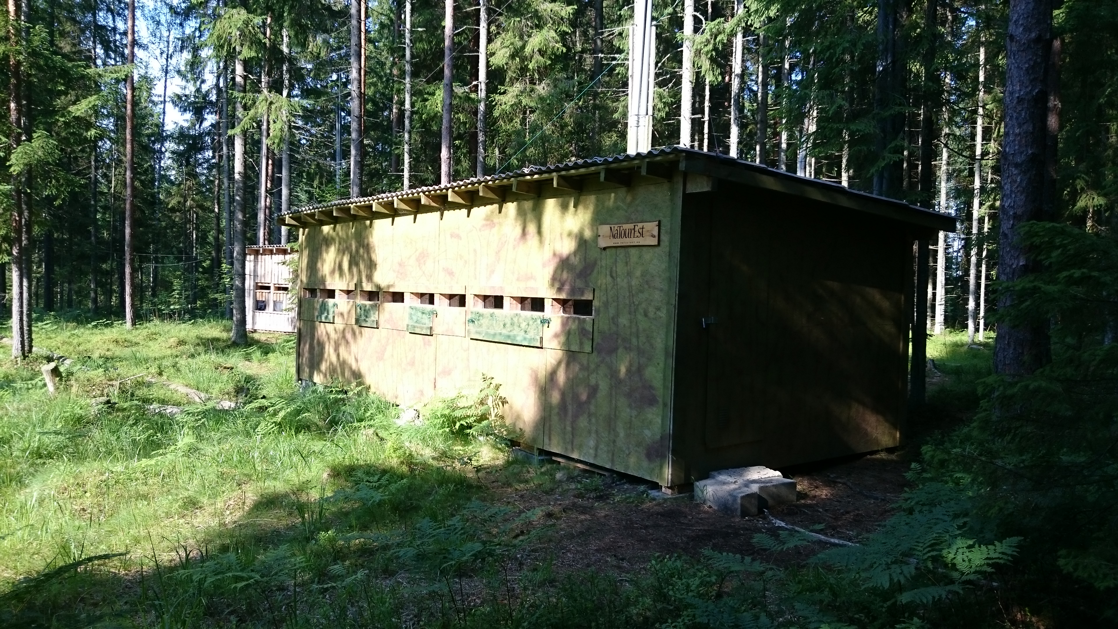 Alutaguse karuvaatlusonn